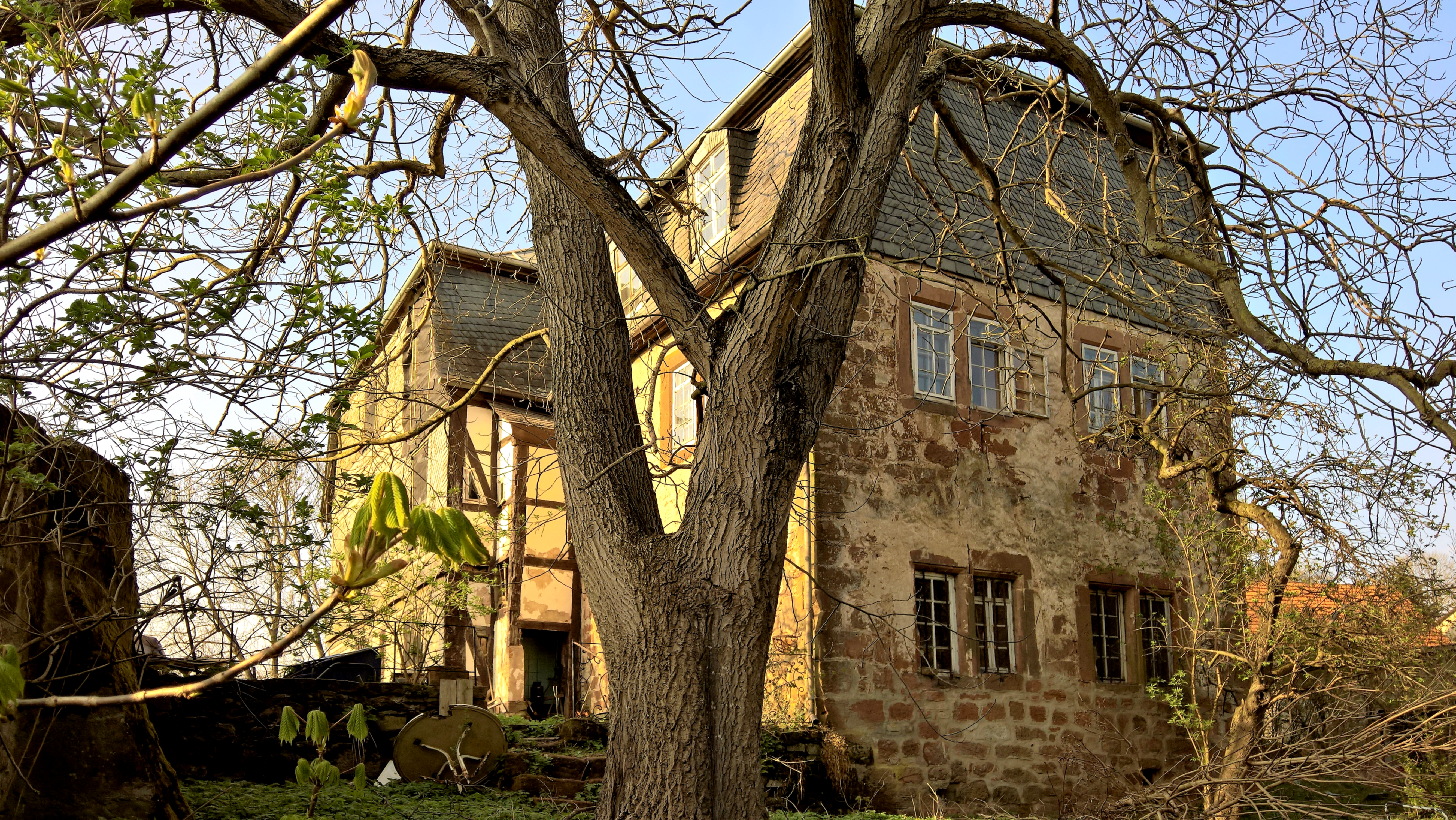 Schlossbau: Wehrturm 15. Jh., quer dahinter Fachwerkbau 18./19. Jh. auf Steinsockel mit Gewölbekellern